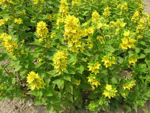 Taškuotoji šilingė (Lysimachia punctata) Šeima. Mirsininiai (Myrsinaceae) Foto: Algirdas, 2006 m. birželio 29 d., Lietuva